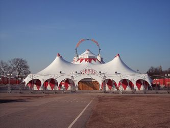 Façade du Cirque Arlette Gruss en mars 2006 sur l'Esplande du Champ de mars à Lille.